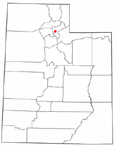 Localización de Morgan, Utah